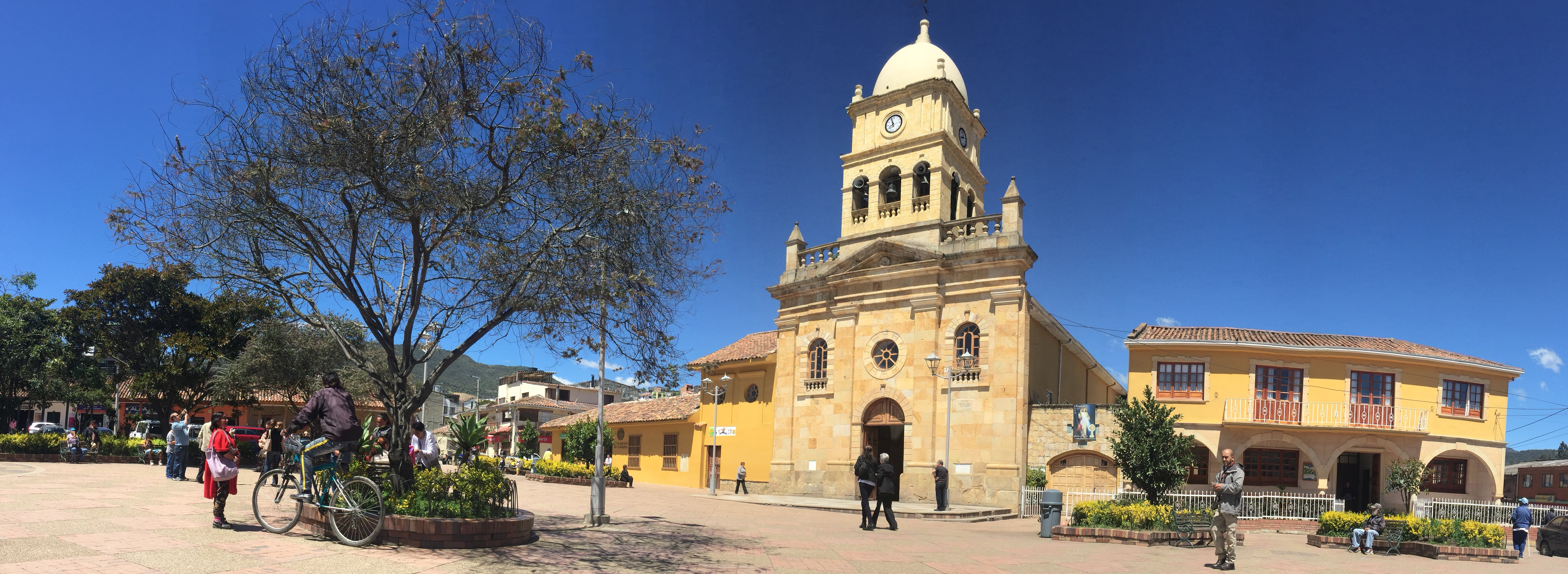 panoramica